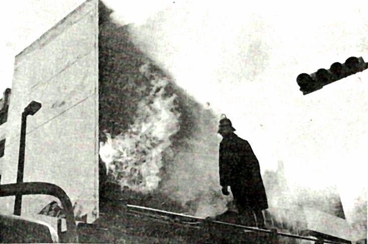 Aqui, el incendio de la tienda "el Mayoreo" en Guadalajara. Era octubre de 1977. El hecho se le atrubuyó a la Unión del Pueblo, aunque nunca se comprobó de manara cabal.